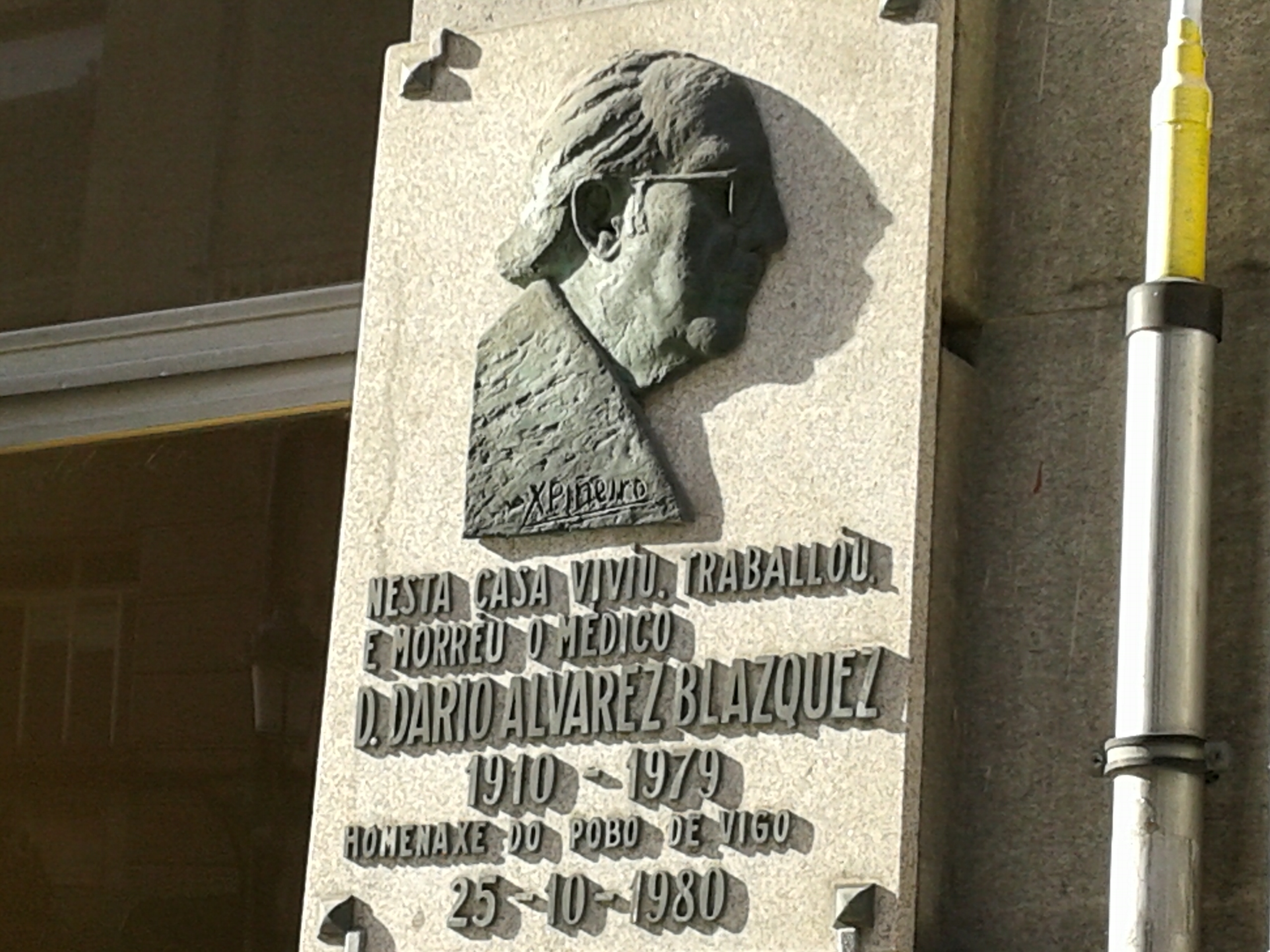 homenaxe na súa casa no número 9 da rúa marqués de valladares de Vigo